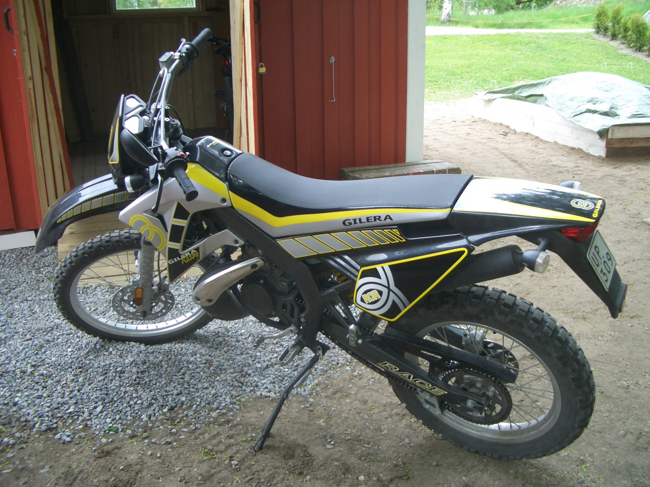 Gilera RCR, Vuosimalli 2005